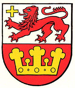 Blazon of Schänis, Canton of St. Gallen - Blazono de Schänis, Kantono de Sankt-Galo